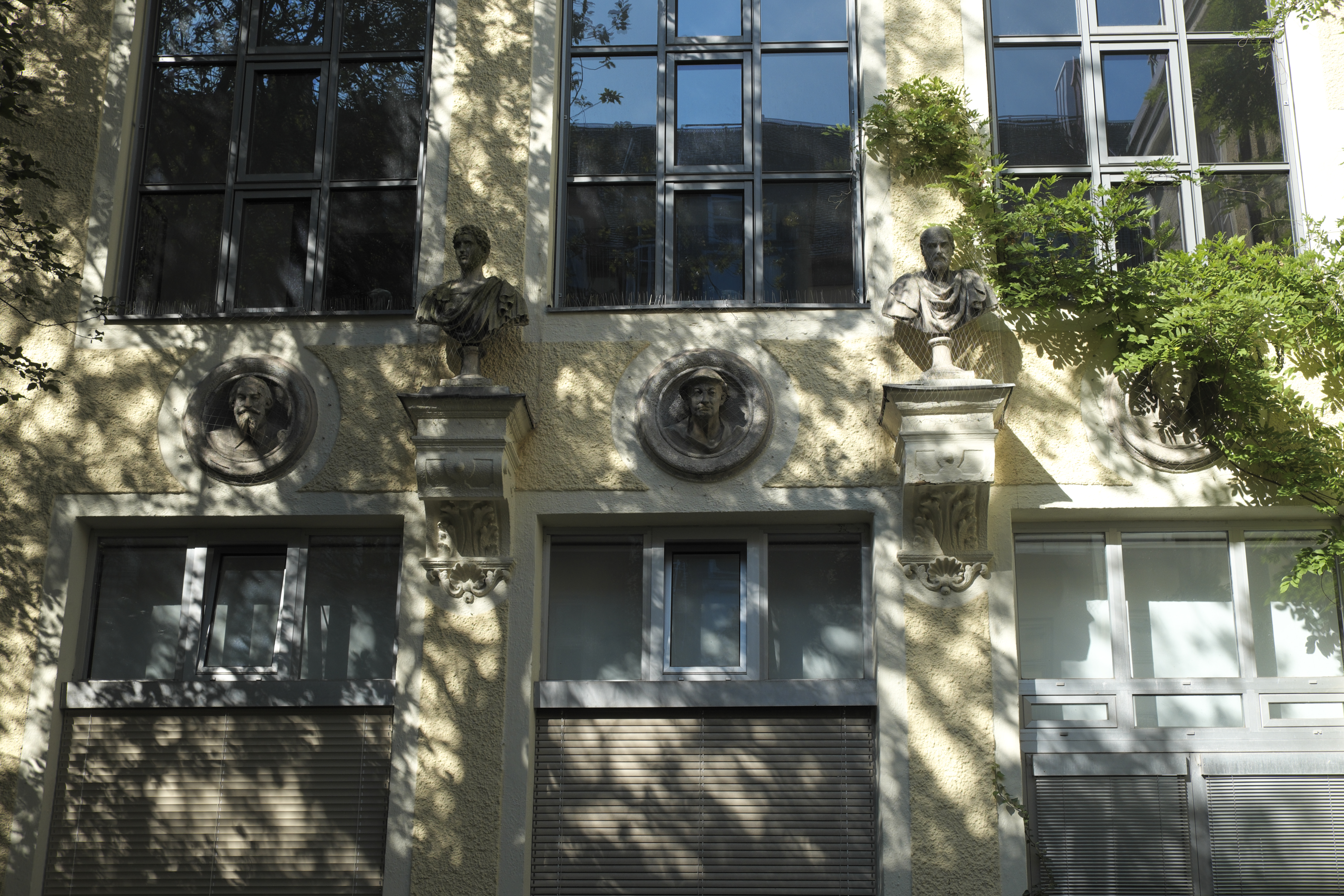 Mietshaus in der Schleißheimer Straße 25 im Stadtbezirk Maxvorstadt in München (Bayern/Deutschland), 1879/80 erbaut, Rückgebäude mit Bauplastik von 1888